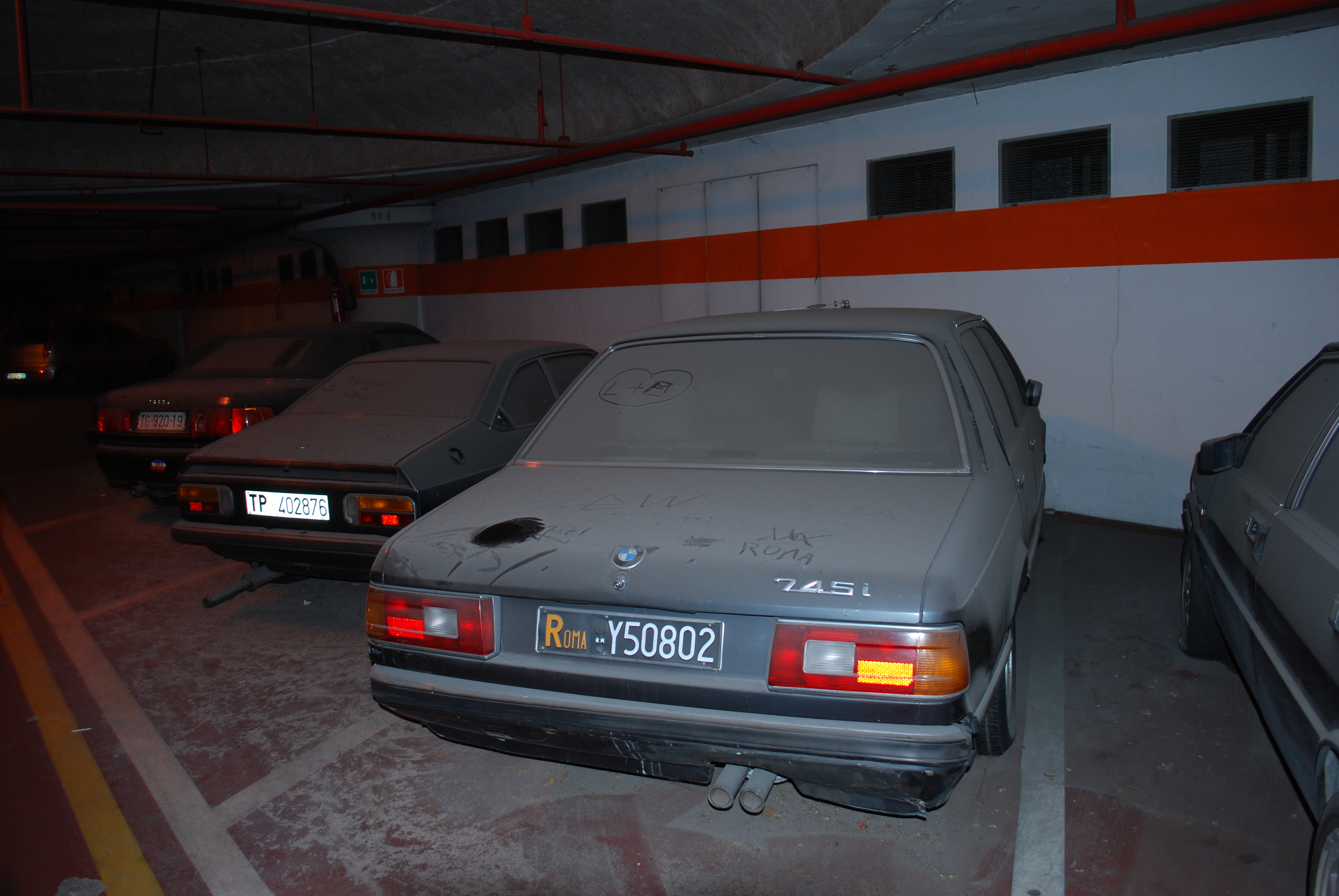 La BMW rinvenuta da Parisi, verosimilmente utilizzata per il rapimento di Emanuela Orlandi